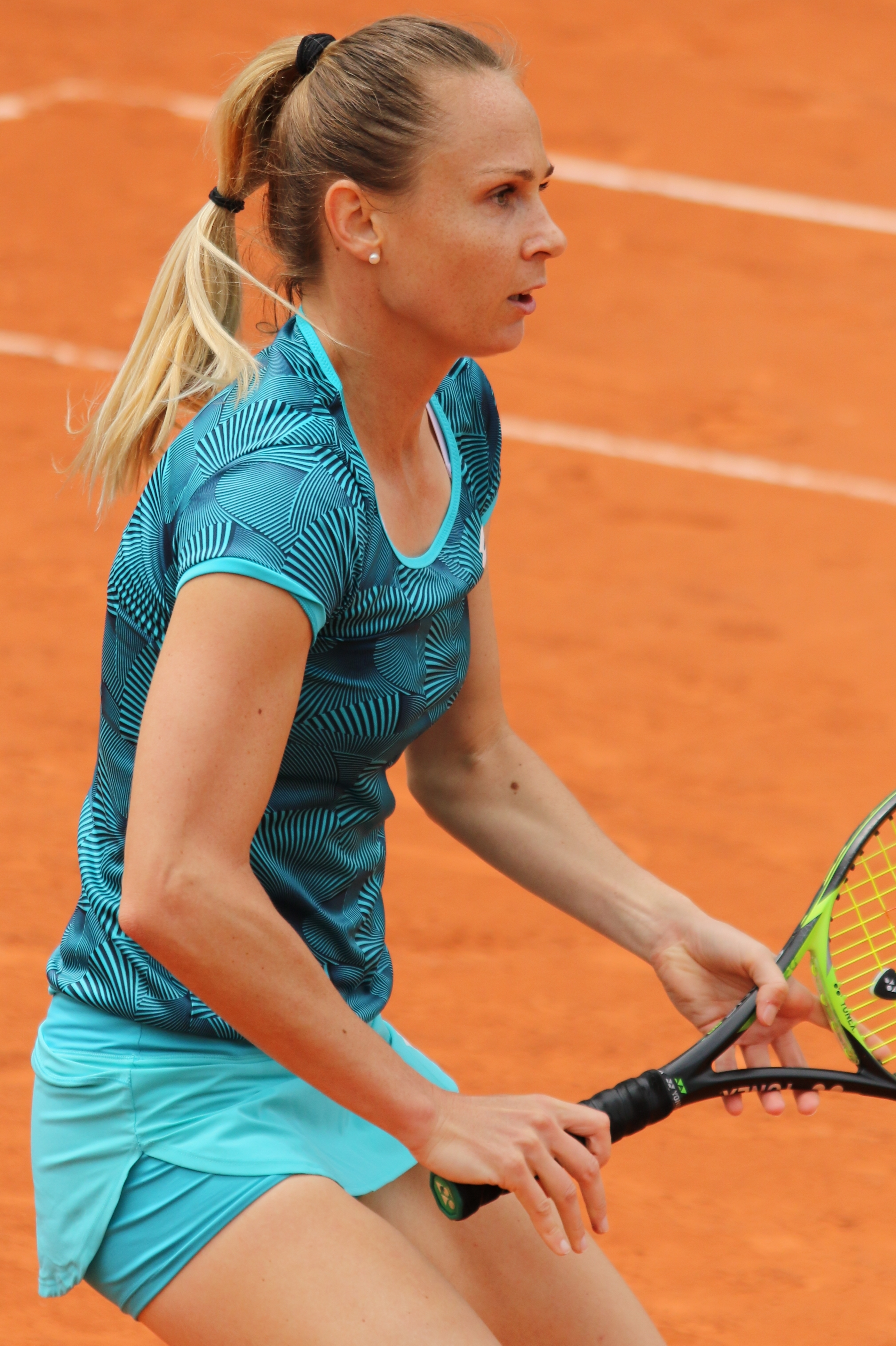 Rybarikova RG19 (10)